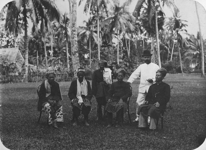 Foto. Groepsportret van lokale bestuurders met hoofdingenieur van de Staatsspoorwegen Jan Willem IJzerman